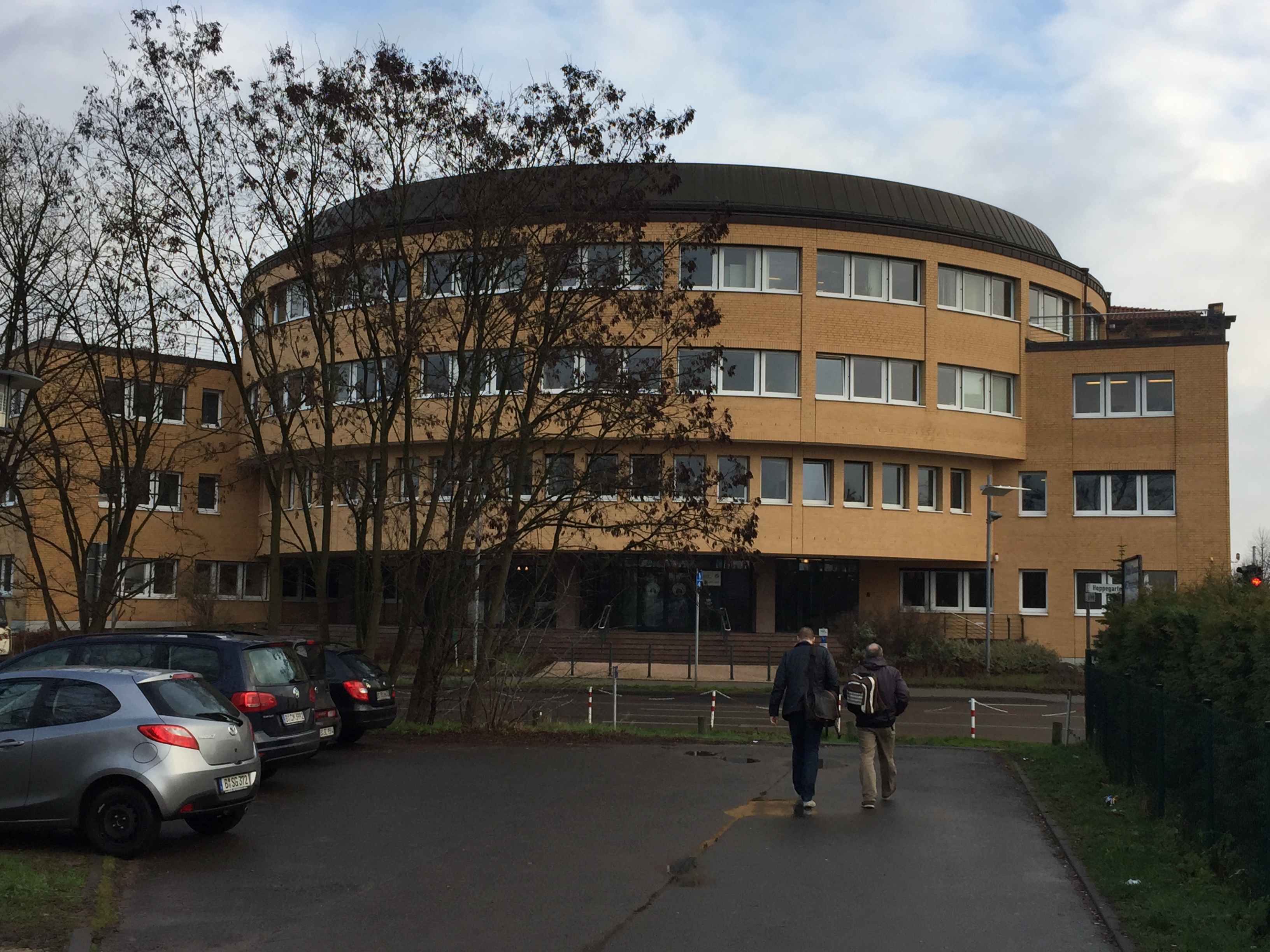 Verwaltungsgebäude SVLFG Hönow/Hoppegarten